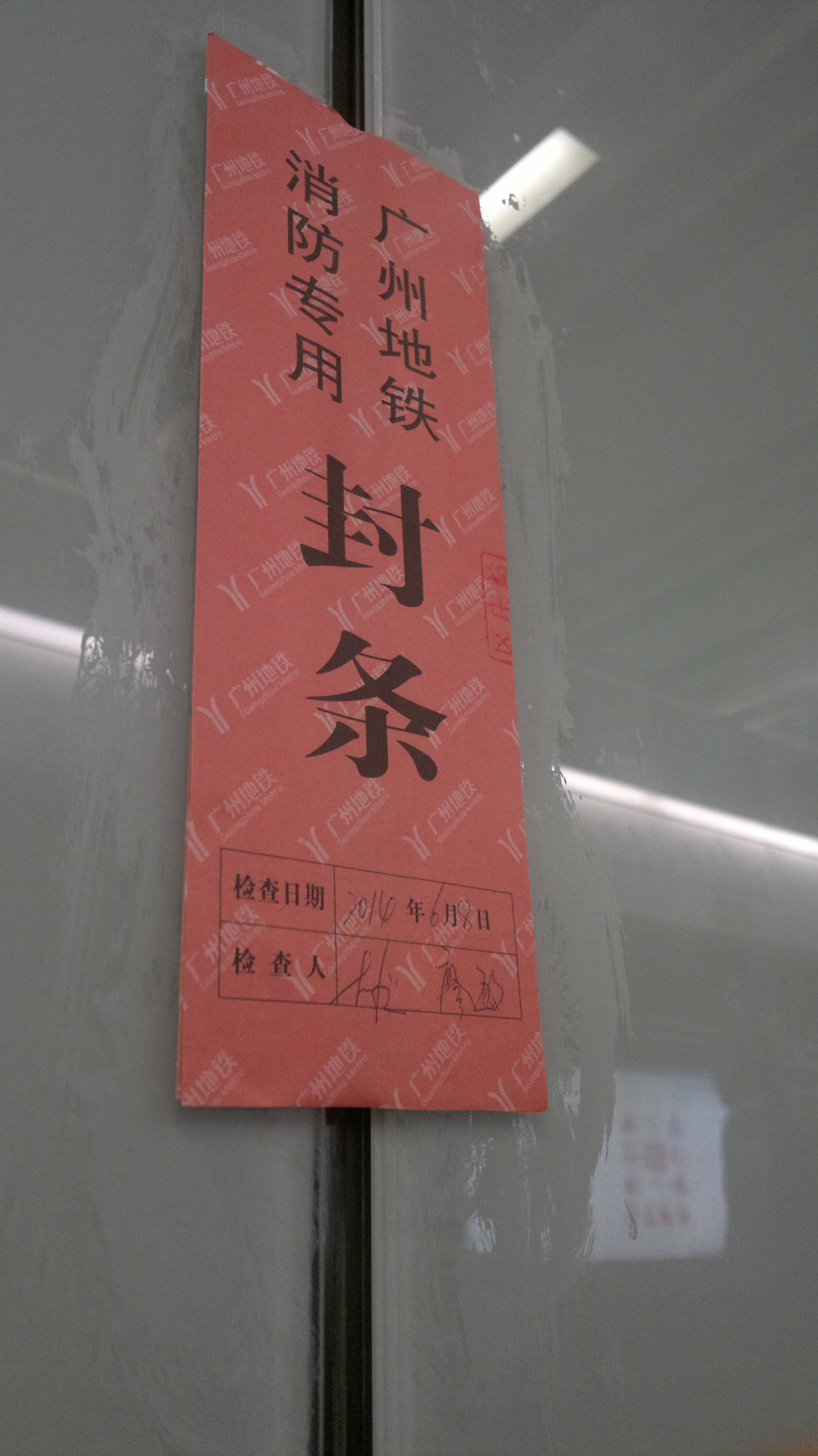 中文（中国大陆）: 广州地铁消防专用封条，用于封地铁站内的消火栓。摄于区庄站6号线站台。